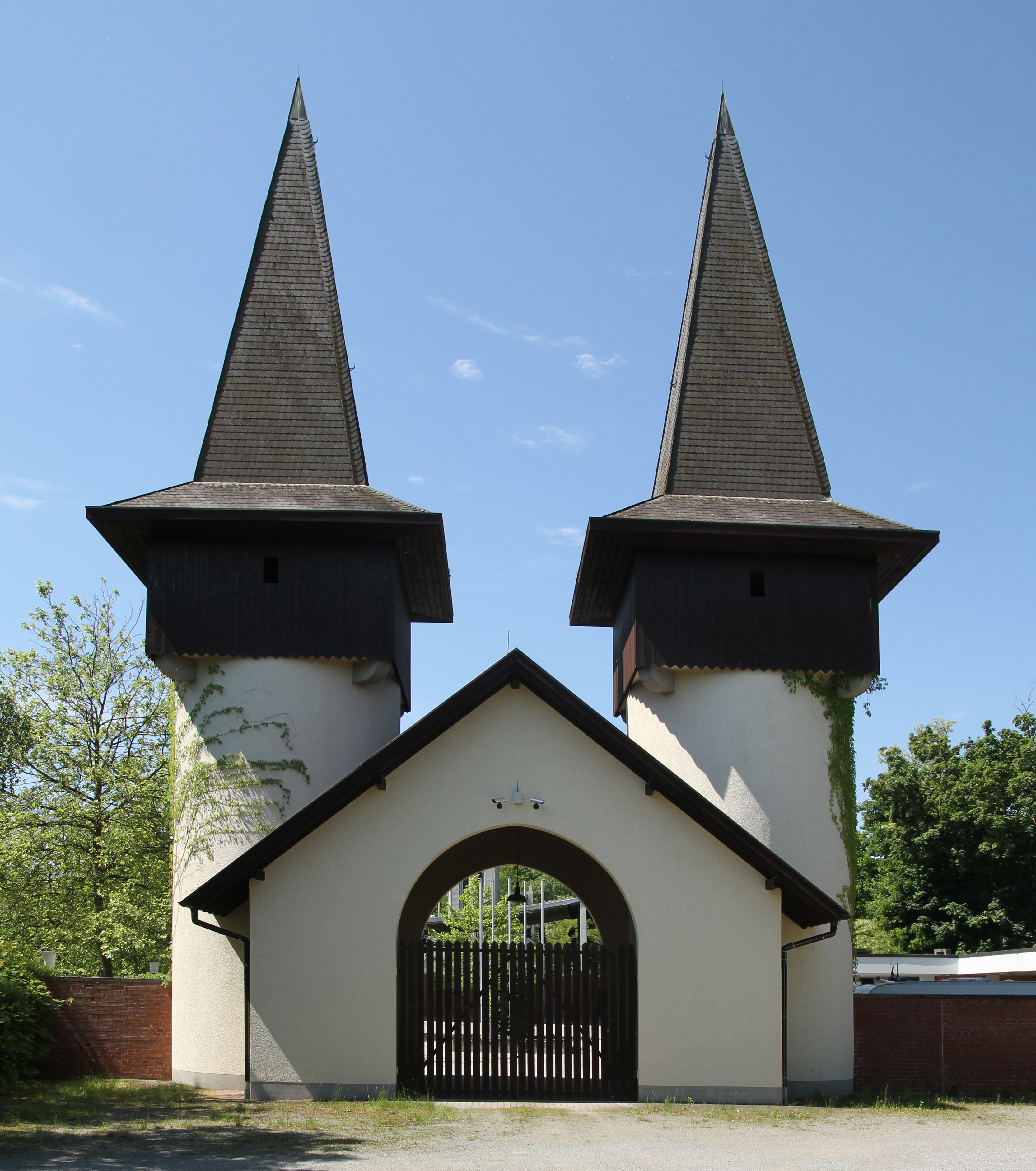 Die Eingangstürme zu den Ötigheimer Volksschauspielen.